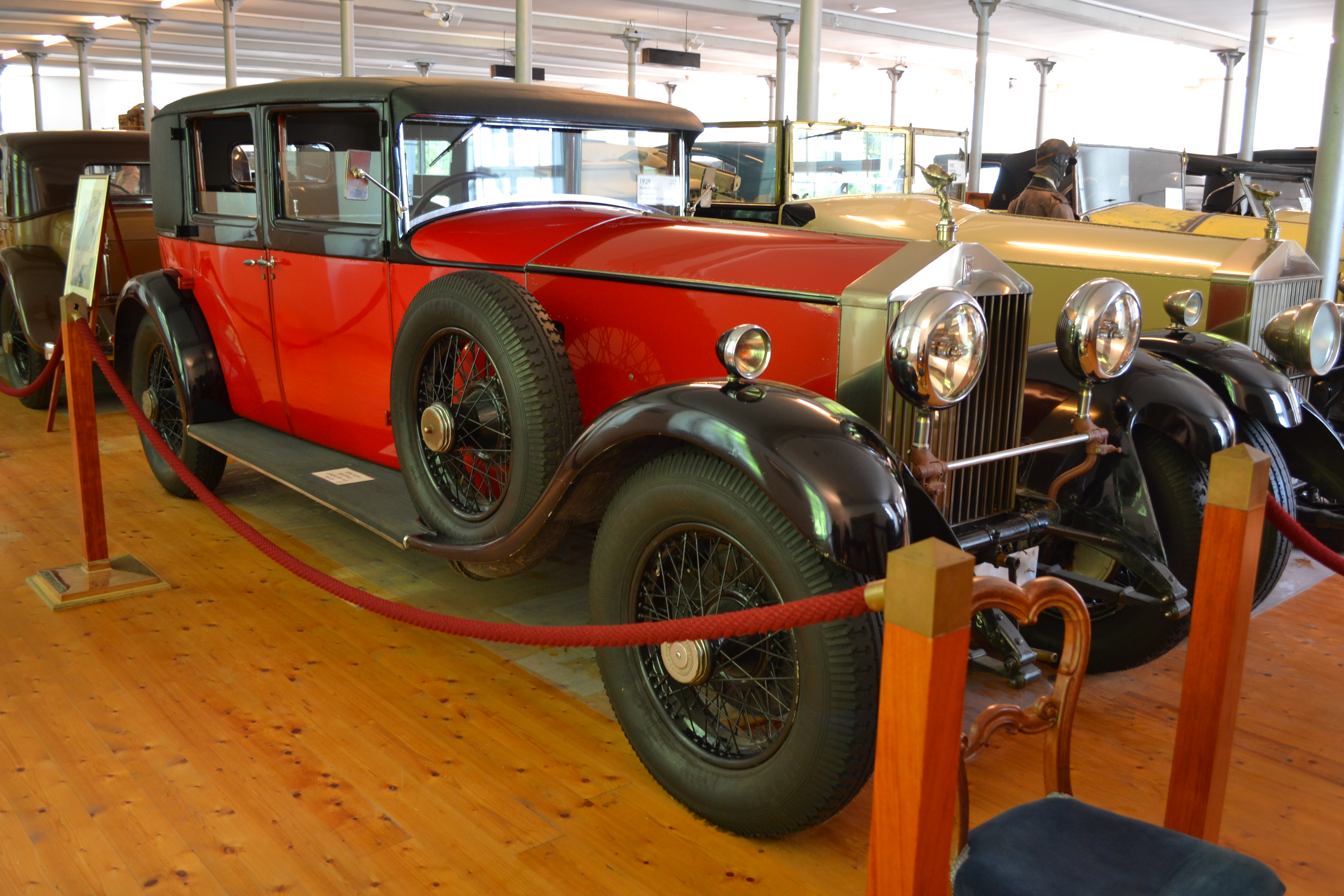 A Rolls-Royce Múzeum Dornbirnben